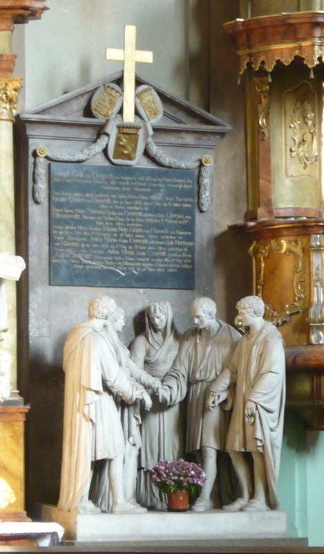 Mníšek pod Brdy, kostel svatého Václava, náhrobek hraběte Josefa Unverta (1753–1822).